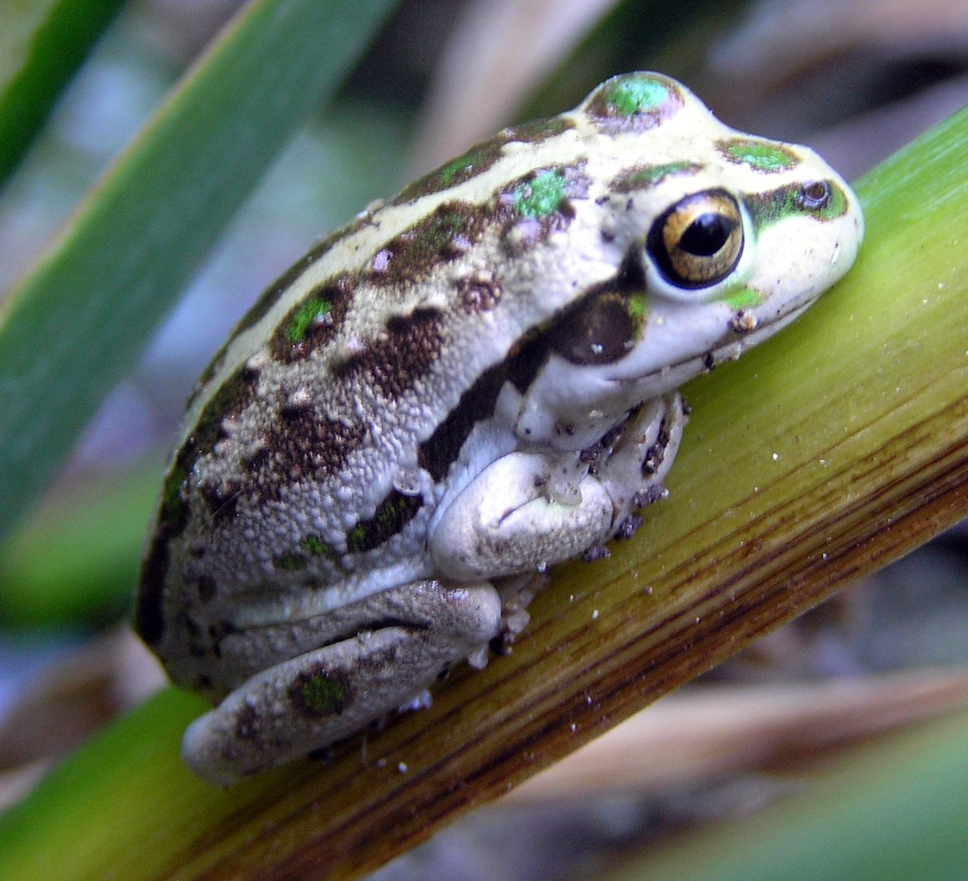 Juvenile (Litoria moorei)